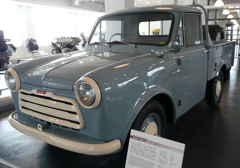 Datsun truck 220.